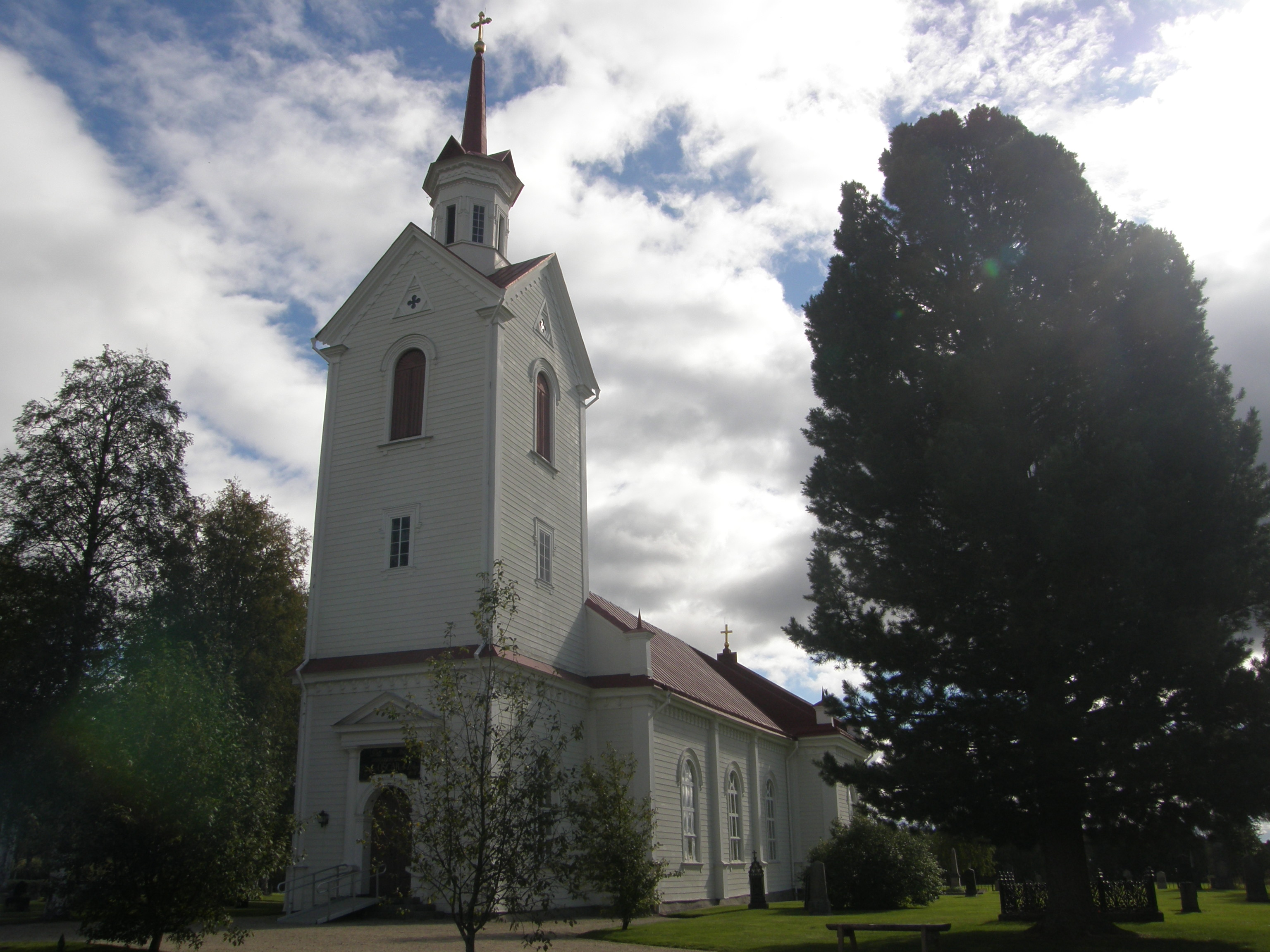 Rätans kyrka